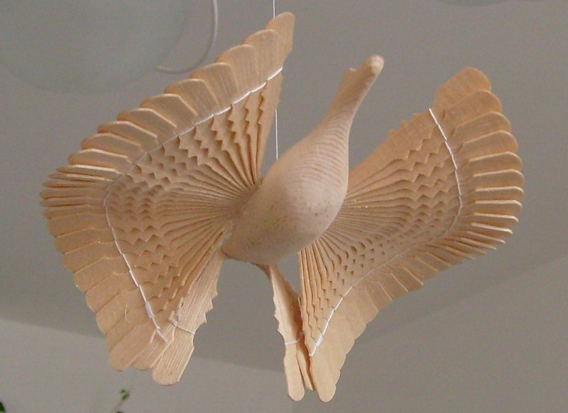 Птица счастья из дерева. Сувенир. Поморское ремесло.